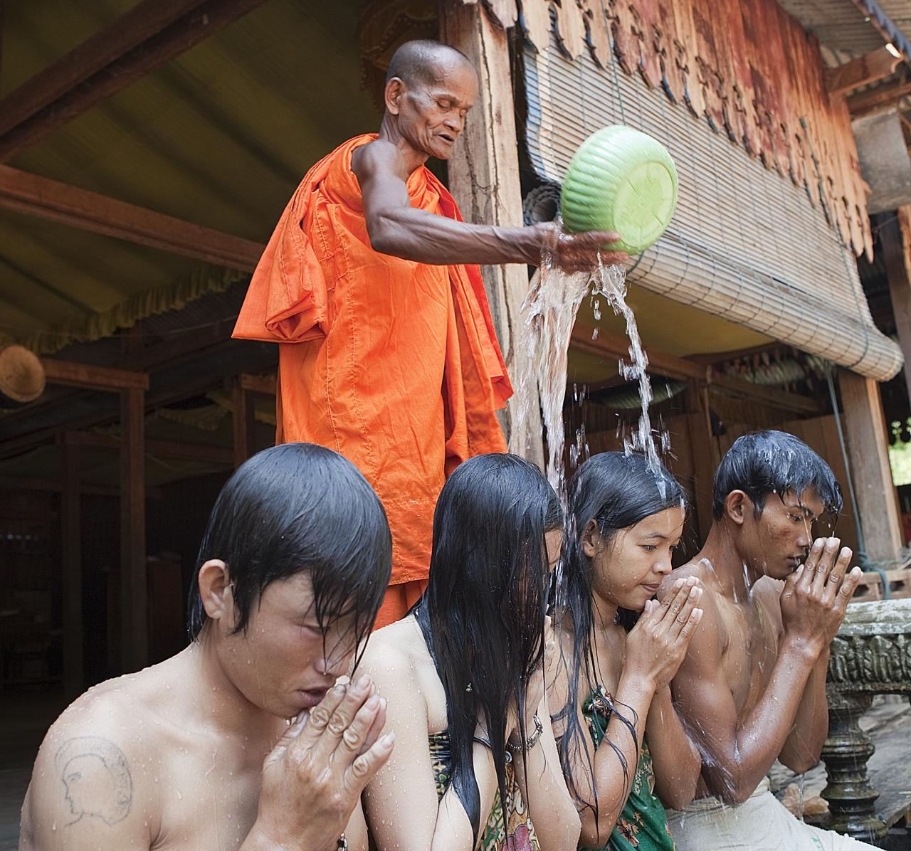 Cambodia